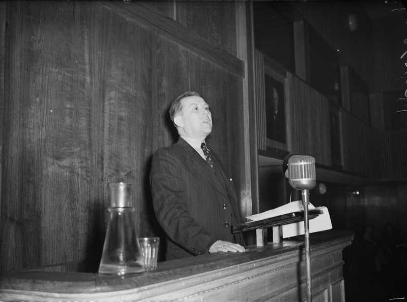 Nils Hønsvald. Samfunnshuset, interiør, storsalen, møte i Oslo samvirkelag, talerstol, mann, statsråd, forsyningsminister, mikrofon, vannkaraffel.